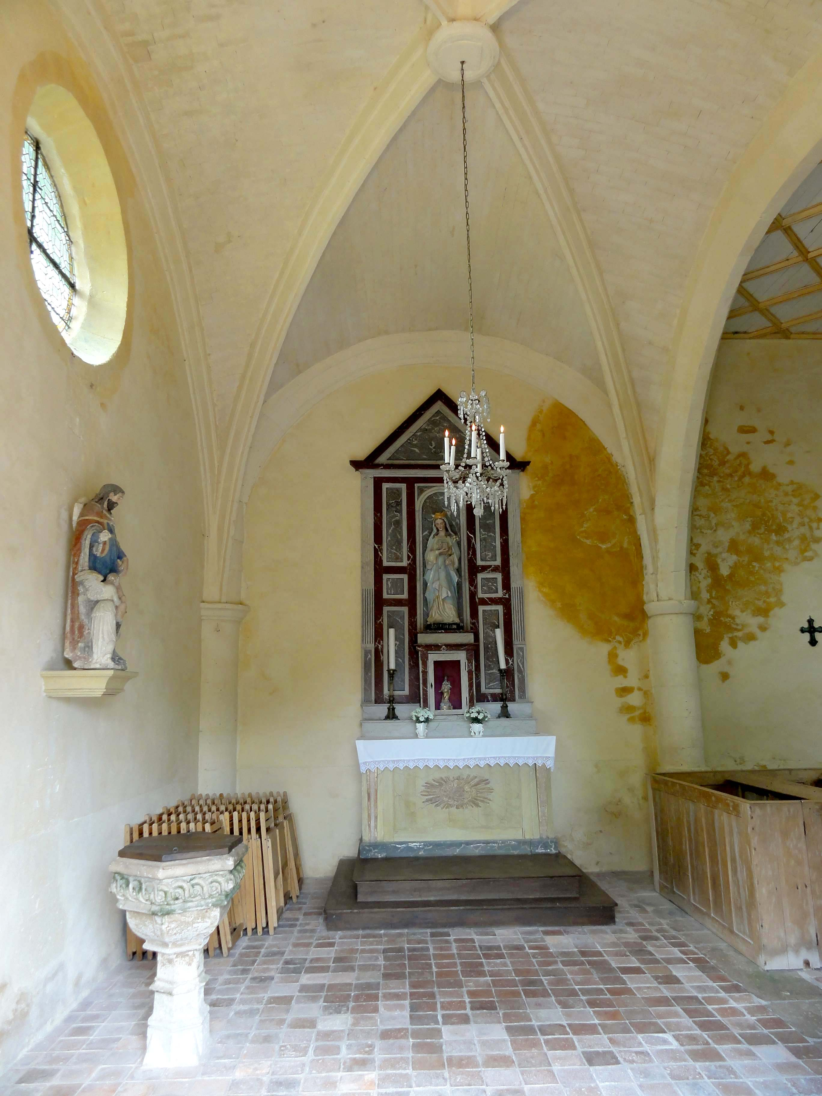 Intérieur de l'église (voir titre).